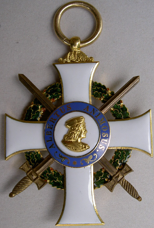 Albrechtsorden